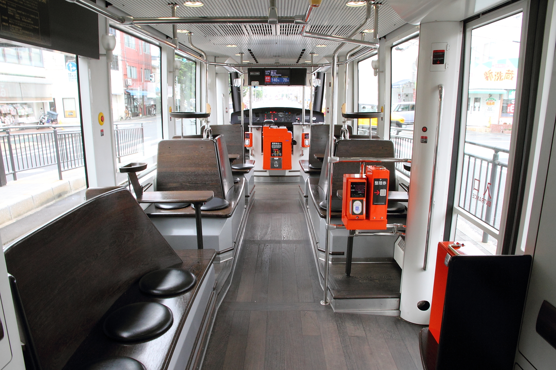 岡山電気軌道9200形1011Aの車内。連結部側から運転台側に向って撮影。内装の使用材木はウェンジ材。